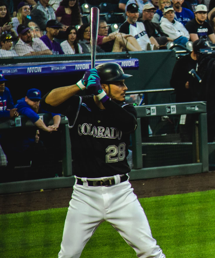 Nolan Arenado